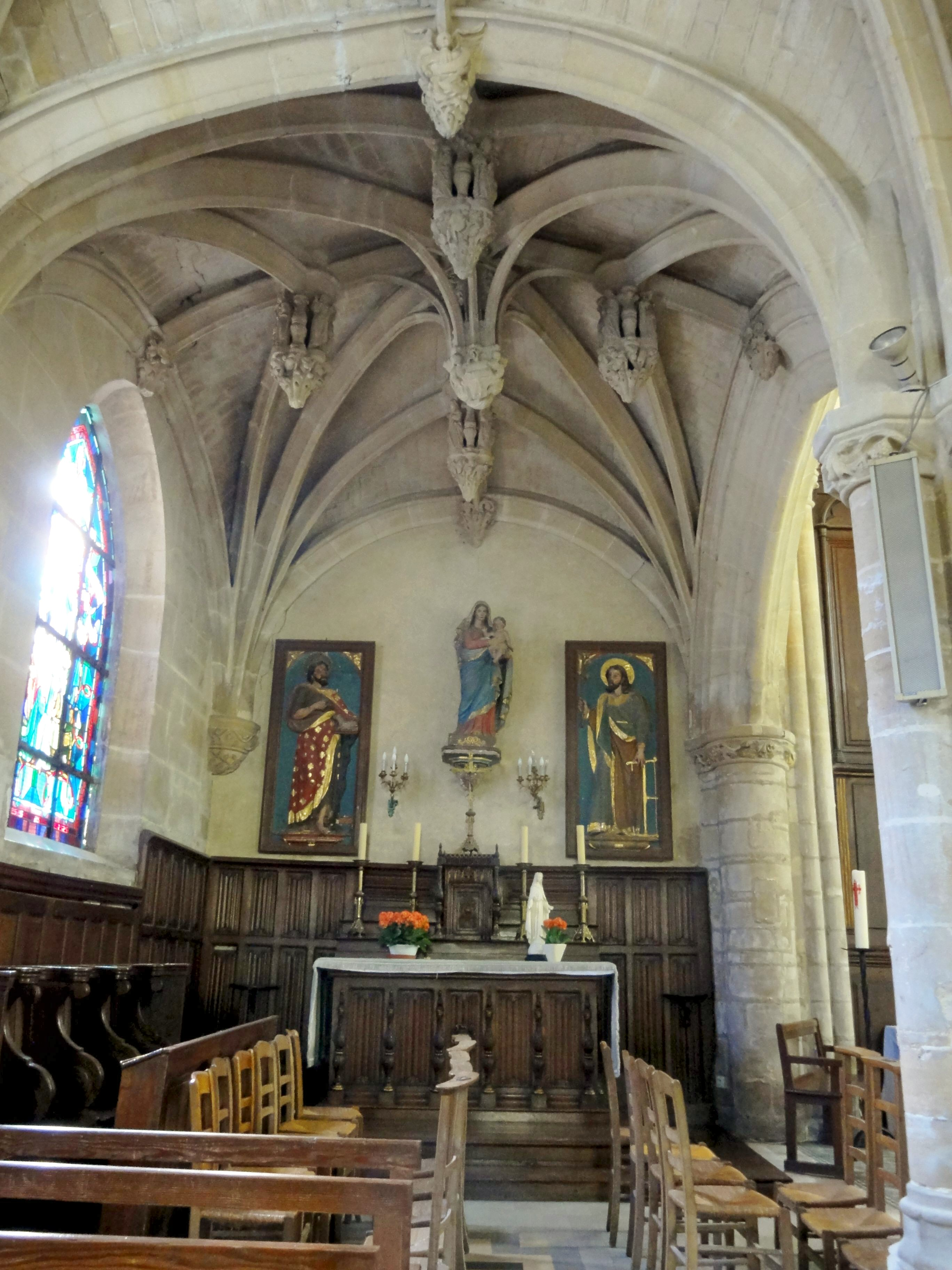 Chapelles nord, 2e travée (chapelle de la Vierge), vue vers l'est.